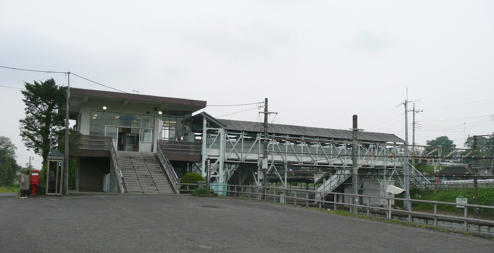 松井田駅